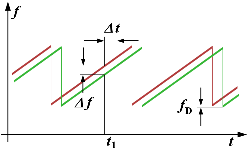 Prinzip des FMCW-Verfahrens: Die Darstellung ist ein Koordinatensystem mit der Skalierung y=f(t) Ein Sender sendet ein linear frequenzmoduliertes Signal aus, hier mit einer sägezahnförmigen Änderung der Sendefrequenz. Das gleiche Signal wird nach einer Reflexion vom Empfänger empfangen. Das empfangene Signal unterscheidet sich einmal in der Zeit: Die Zeitdifferenz Δt zwischen den Frequenzsprüngen ist proportional zur Entfernung des reflektierten Objektes. Gleichzeitig ist (lineare Frequenzänderung vorausgesetzt) zu jedem Zeitpunkt (auch zum gezeigten Zeitpunkt t1)die Differenzfrequenz zwischen Sende- und Empfangssignal gleich und ist so ebenfalls ein Maß für die Entfernung des reflektierenden Objektes. Wenn sich das reflektierende Objekt bewegt, unterscheidet sich auch die untere und die obere Grenzfrequenz des Signals. Diese Differenz ist dann die Dopplerfrequenz, die hier nur als Messfehler in Erscheinung tritt.